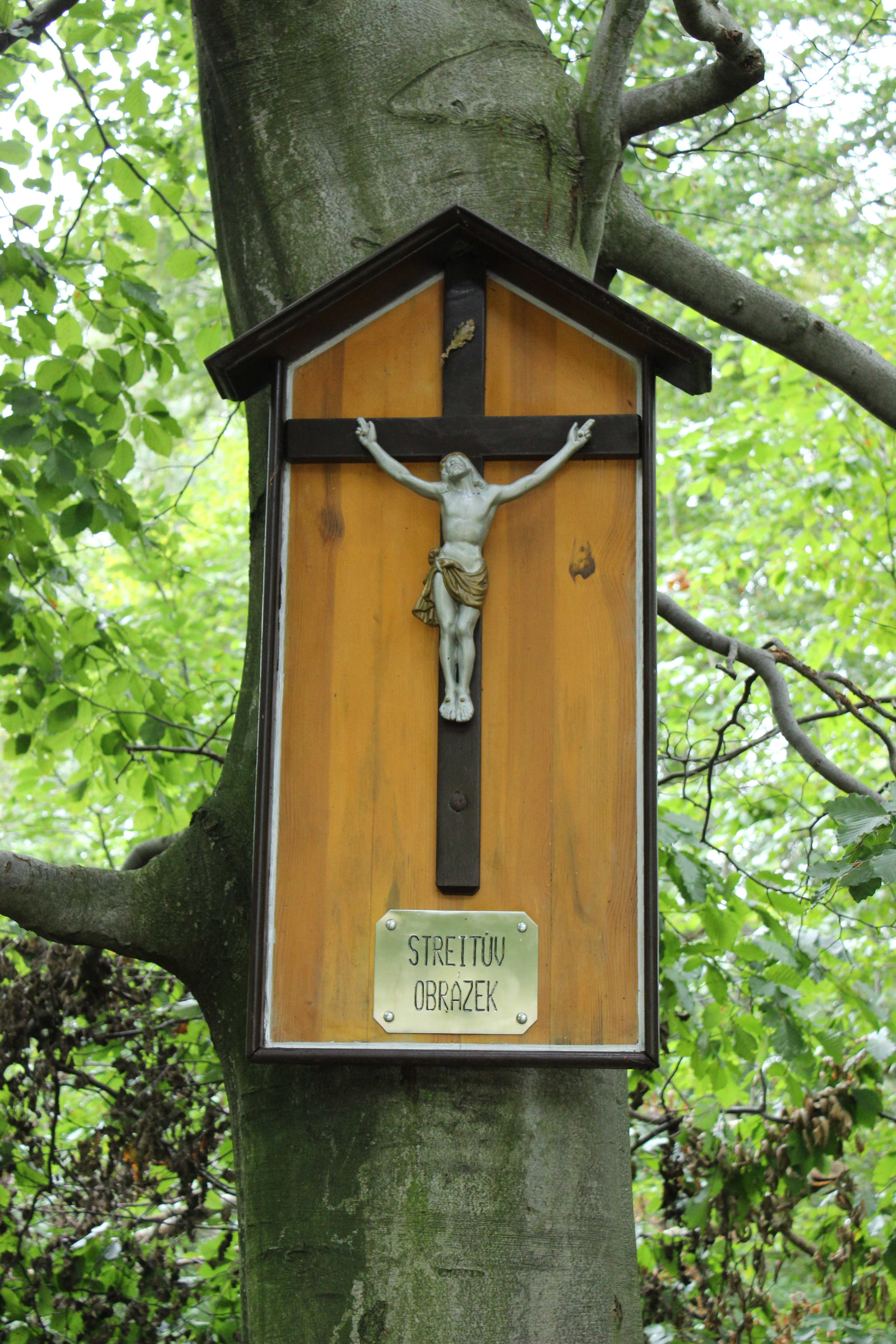 Rozcestník turistických tras v Jizerských horách nazvaný „Streitův obrázek“.